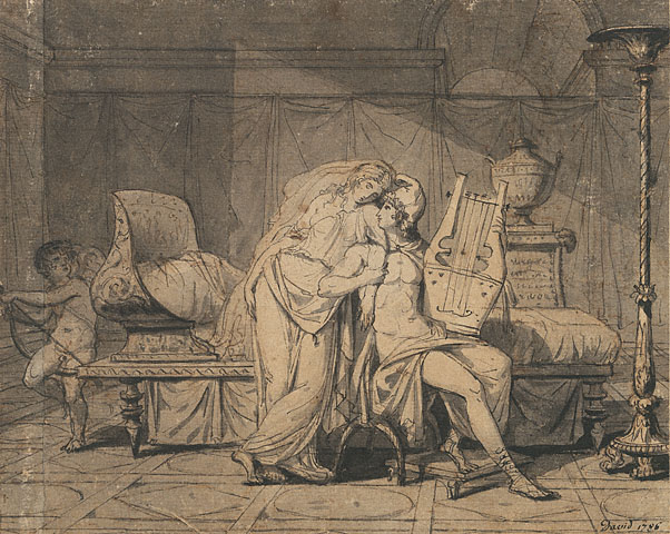 J. Paul Getty Museum , French, 1786 Pen and black ink and gray wash 7 3/16 x 9 in.